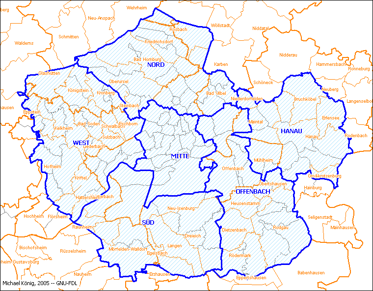 Gebietskulisse (Variante B3, mit Hanau) der geplanten Regionalstadt Frankfurt (sog. Möller-Plan, 1971). Zur Orientierung sind die bei der hessischen Gebietsreform 1972-77 geschaffenen Großgemeinden und Landkreise hinterlegt (orange).